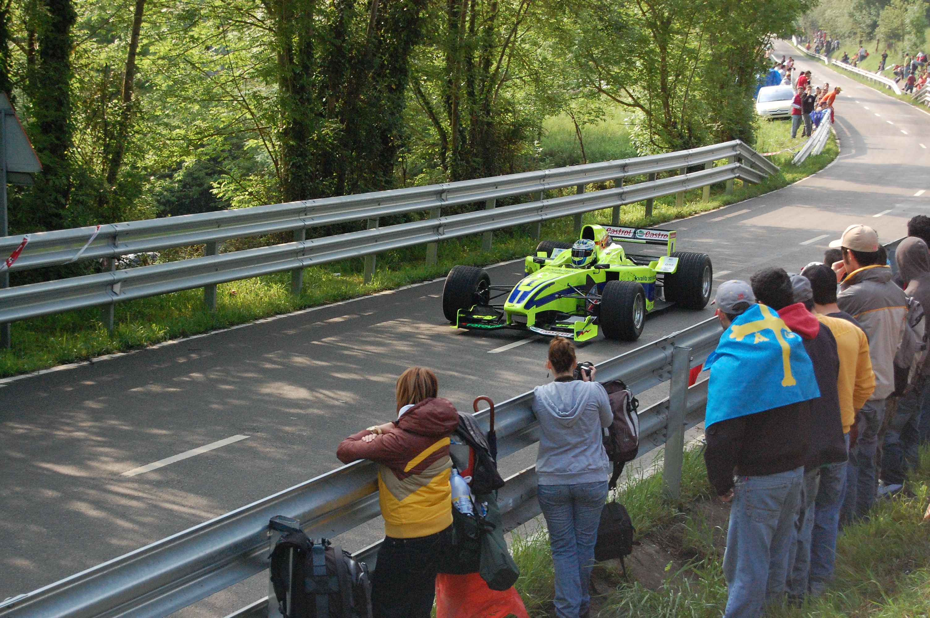 Subida al Fito 2008. Campeonato de Europa de Montaña